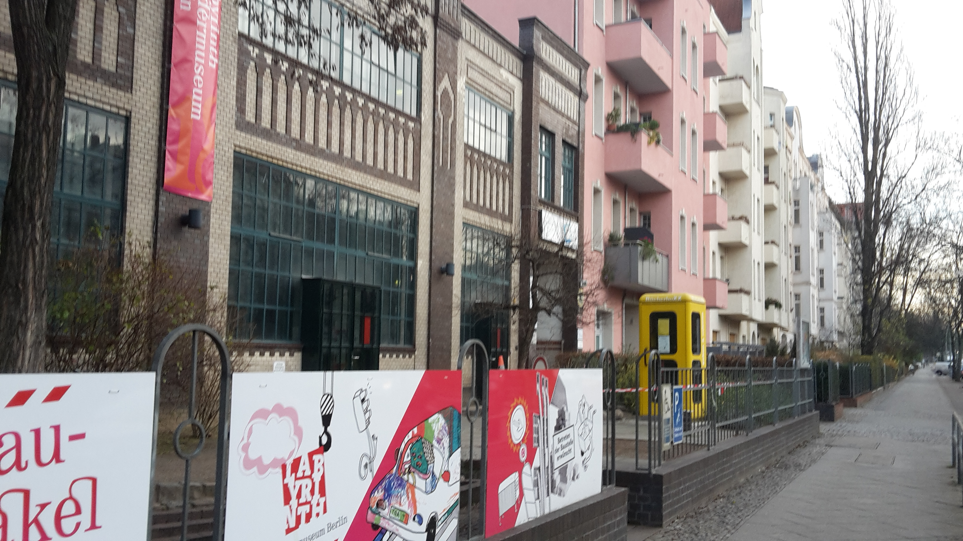 Gebäude des Labyrinth Kindermuseum in Berlin, Osloer Str. 12, mit der Bücherboxx auf dem Gelände.